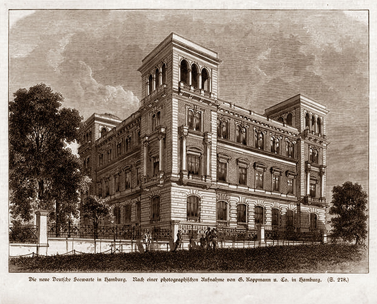 Gebäude der Deutschen Seewarte in Hamburg-St. Pauli, auf dem Stintfang